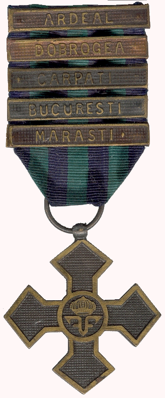 Crucea Comemorativă a Războiului 1916-1917